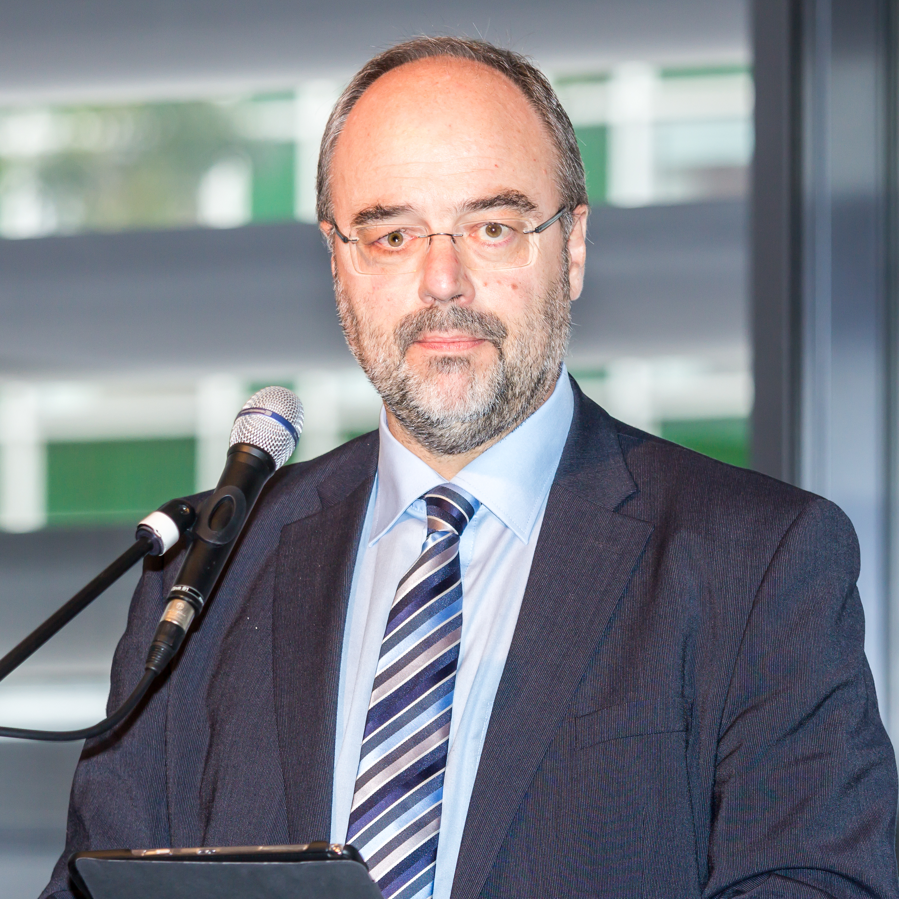 11. Nationaler Aktionstag für die Erhaltung schriftlichen Kulturguts. Motto: „Zusammen sind wir stark! Bestandserhaltung im Verbund“. Veranstaltungsort: FORUM VHS im Kulturquartier am Neumarkt, Köln Foto: Dr. Michael Hollmann, Präsident des Bundesarchivs und Sprecher der Allianz Schriftliches Kulturgut Erhalten